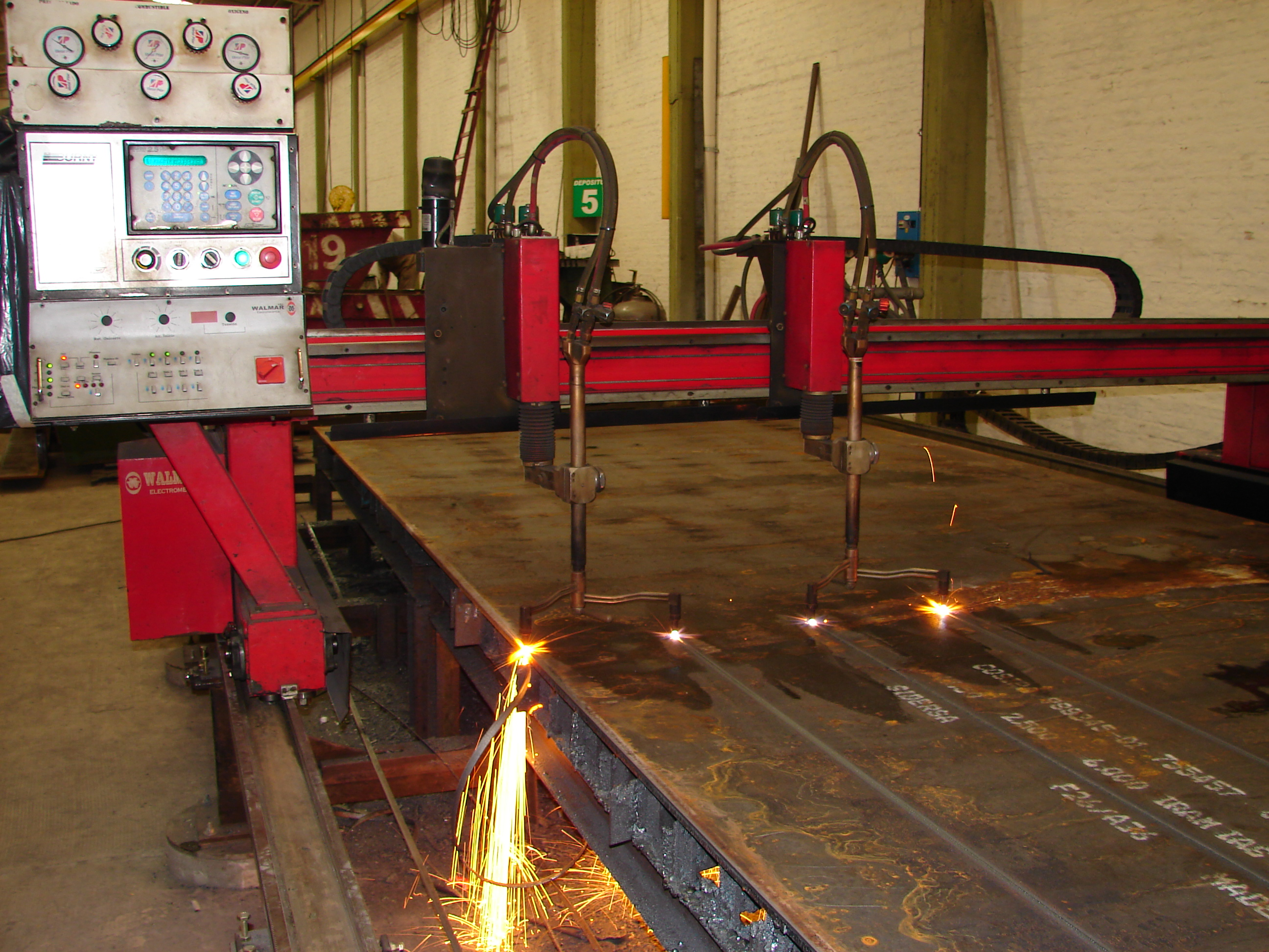 Flejado